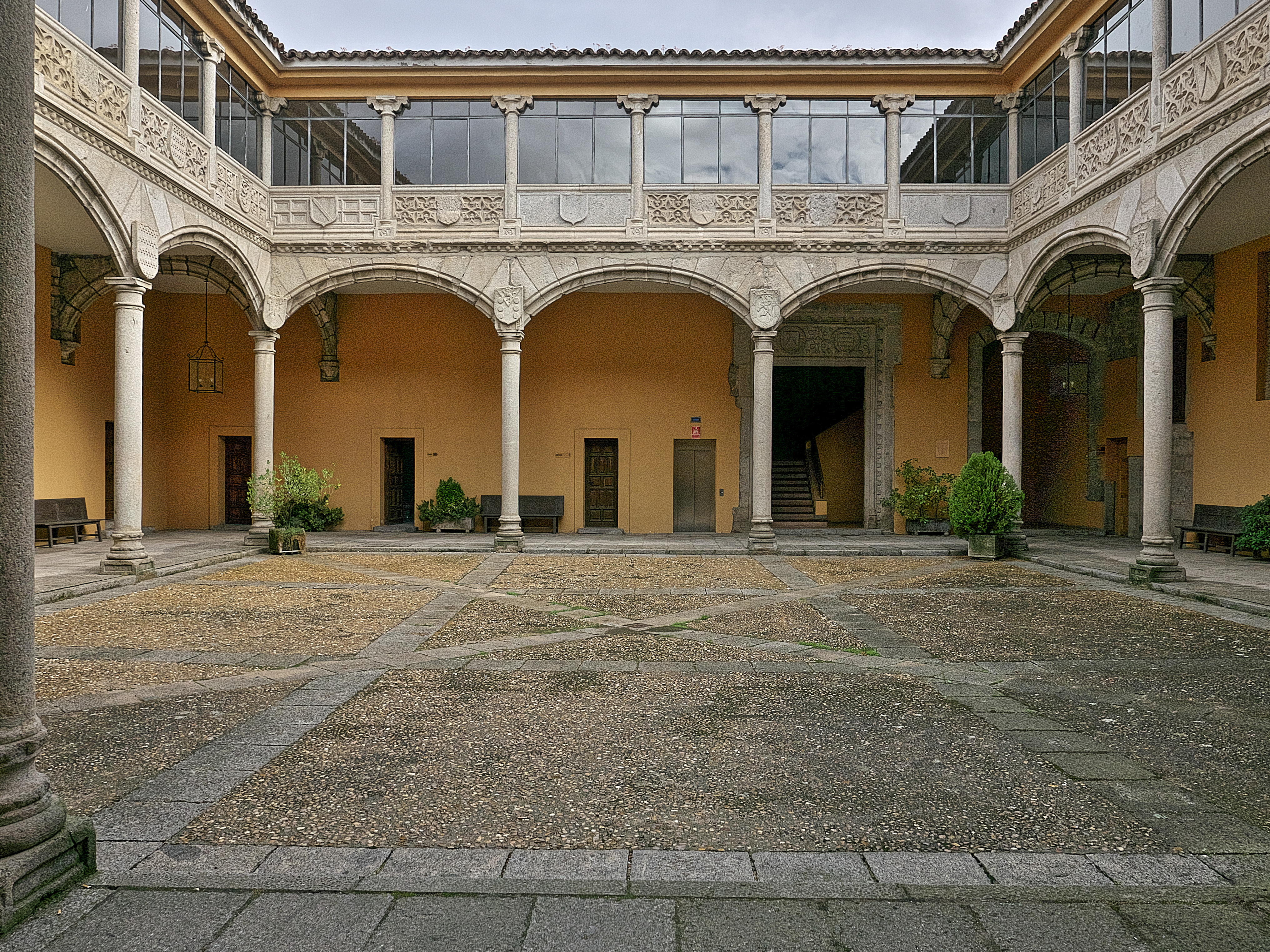 Álvaro Dávila (†1435), mariscal de Catilla y señor de Peñaranda, casado don Juana de Bracamonte, promueve su palacio en Ávila.